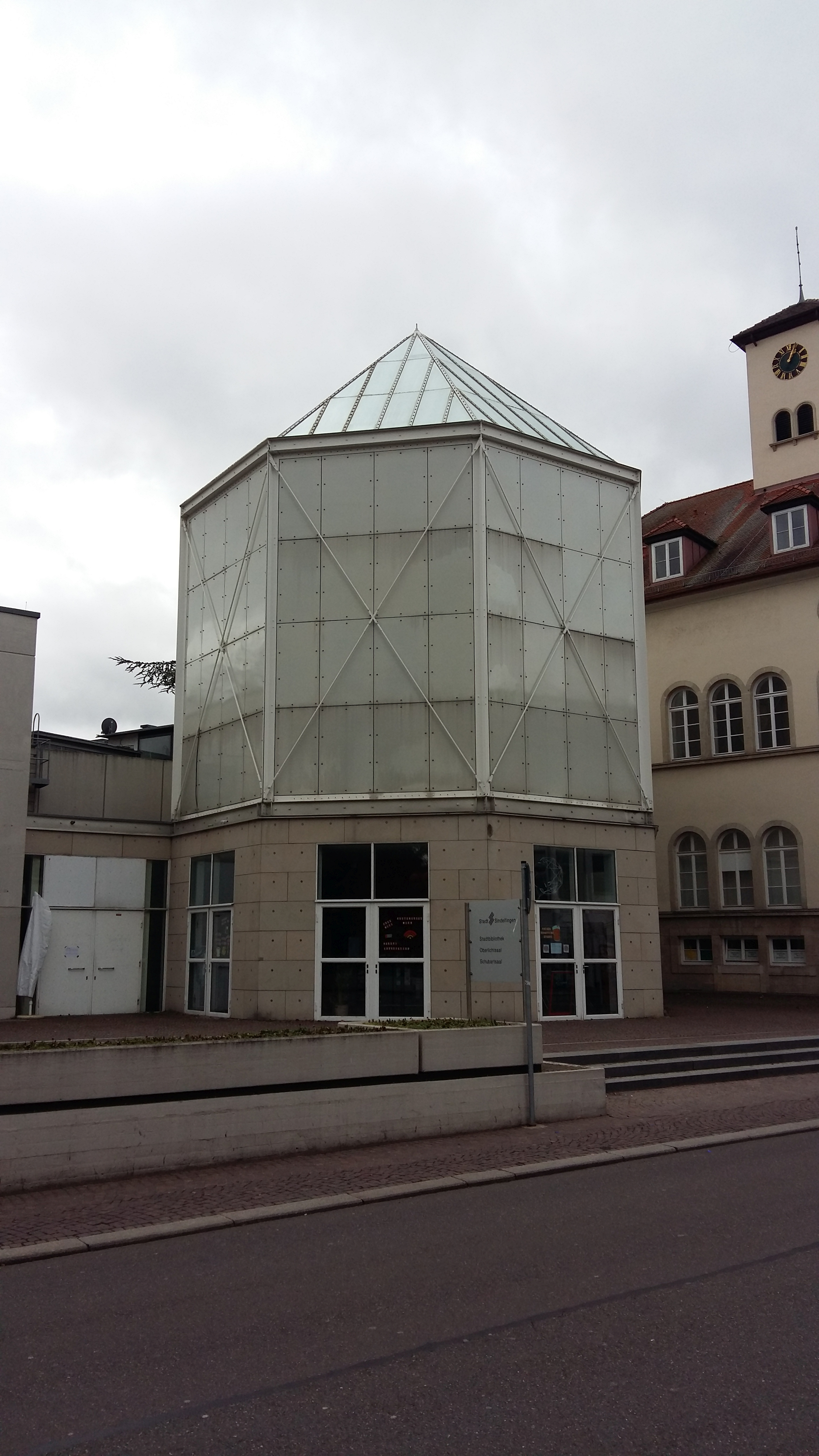 Oktogonaler Neubau an der Galerie Stadt Sindelfingen